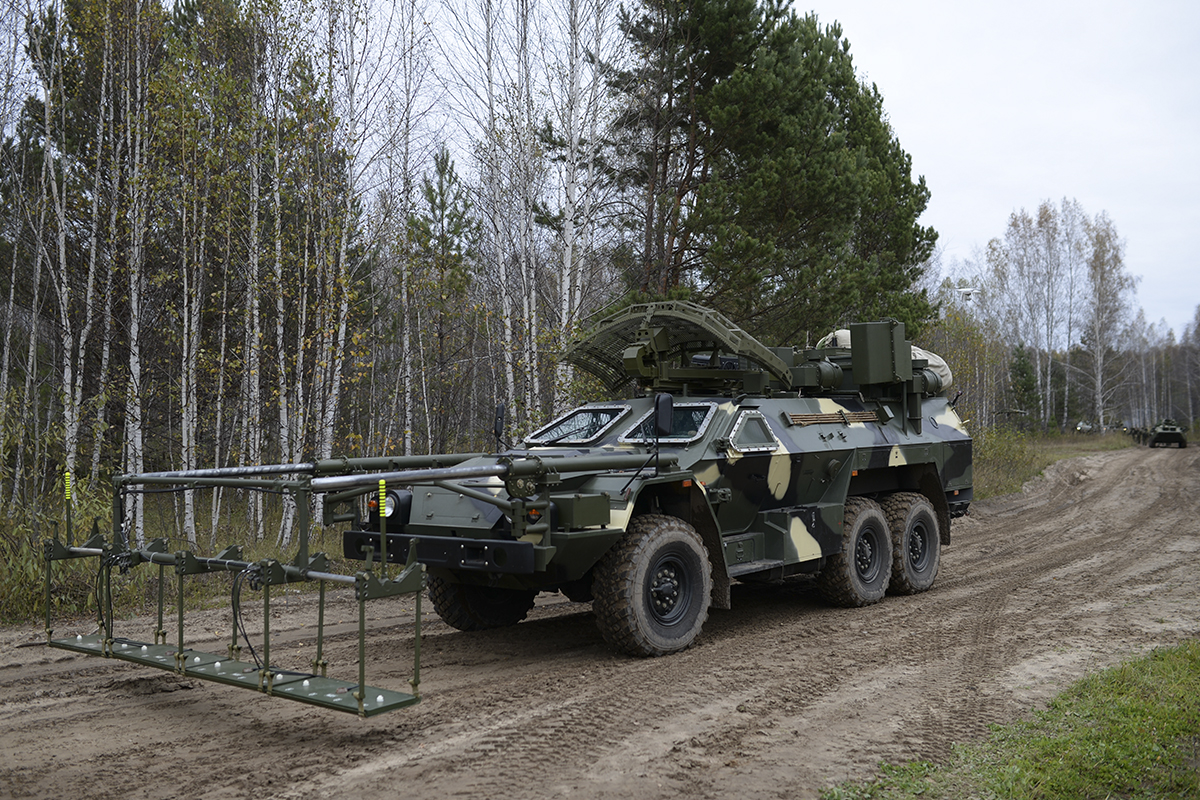 Машина дистанционного разминирования «Листва» на командно-штабном учении с новосибирским соединением Ракетных войск стратегического назначения.